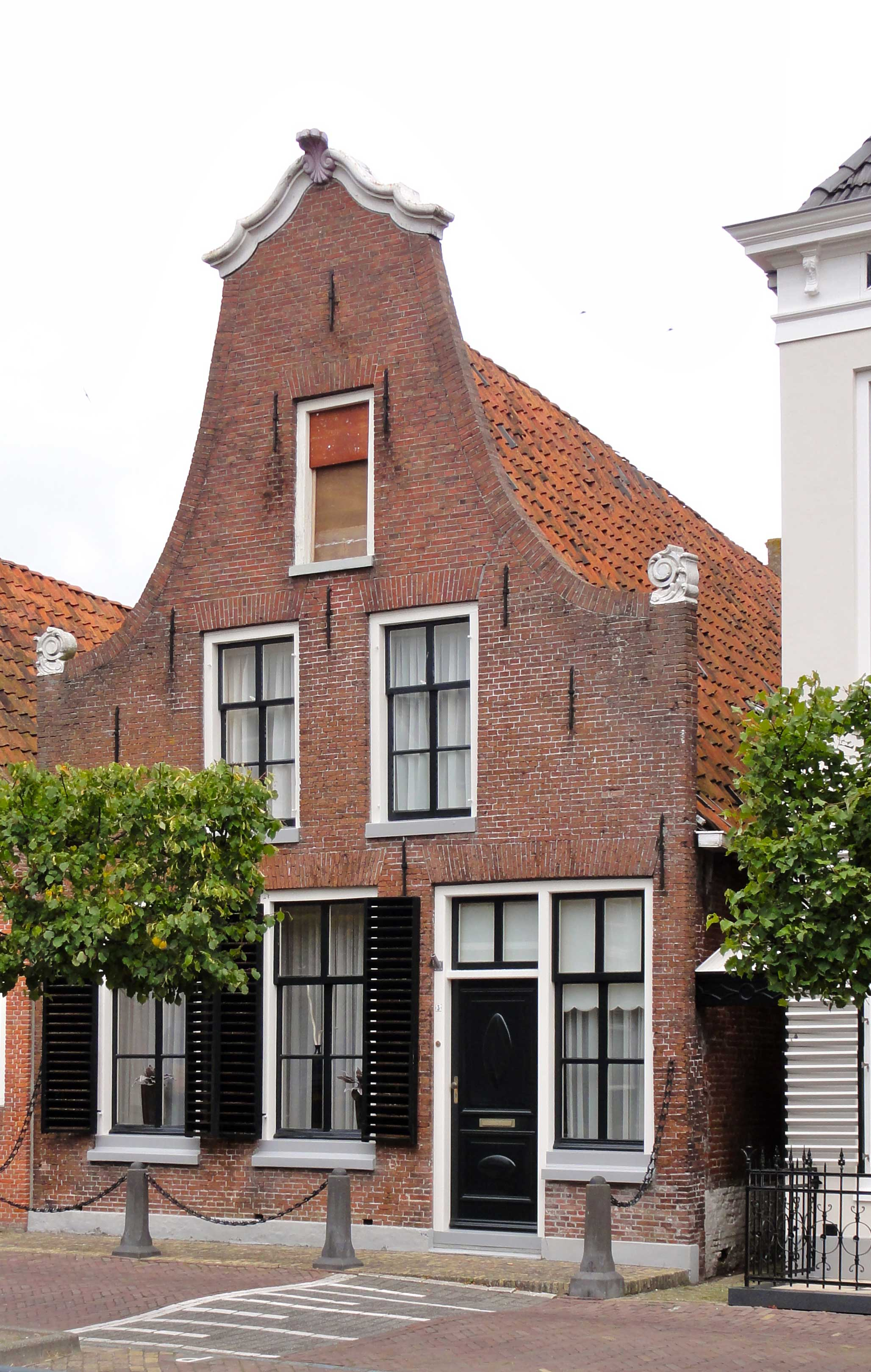 Turfmarkt 3 te Makkum